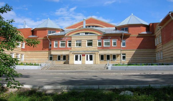 Школа в селе Суда, построенная в 2005-м году